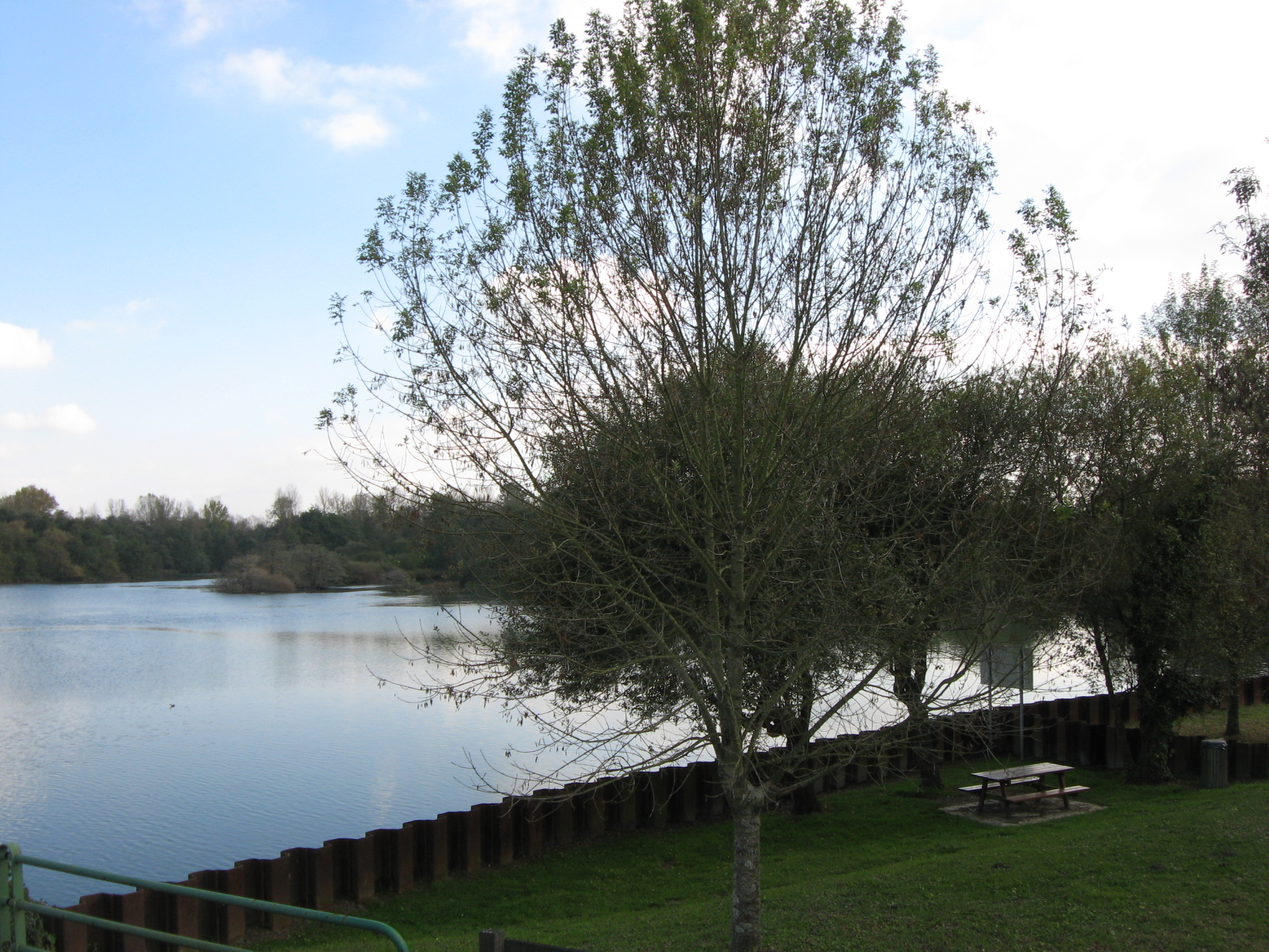 Vue du lac artificiel d'Artix (réserve ornithologique) (Pyrénées Atlantiques) Pyrénées).